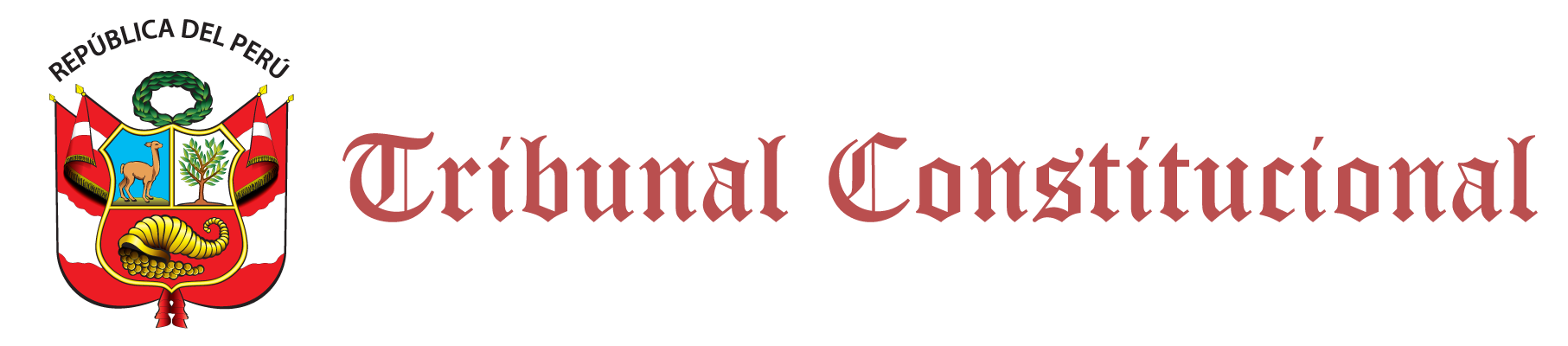 Tribunal Constitucional